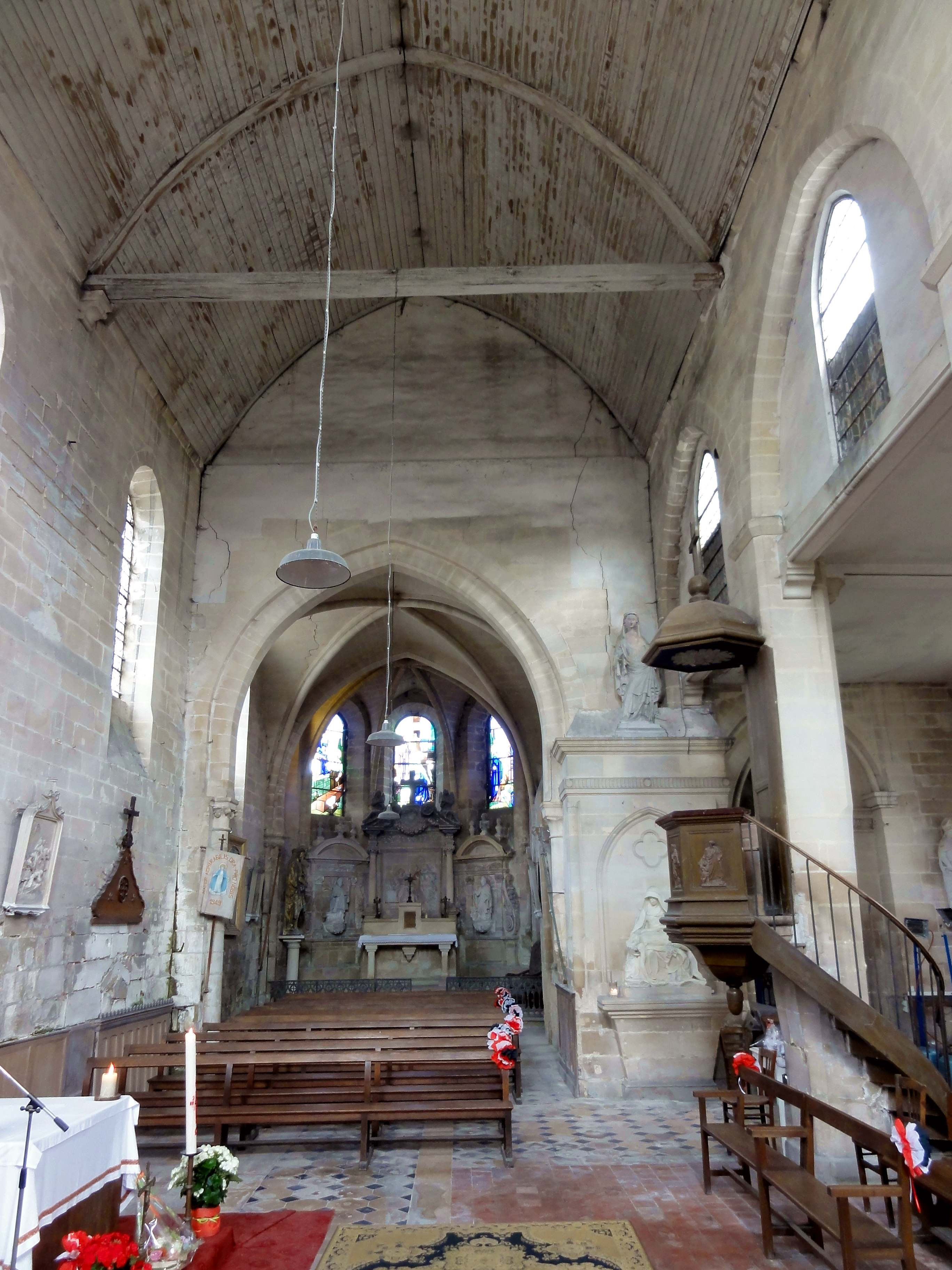 Intérieur de l'église (voir titre).